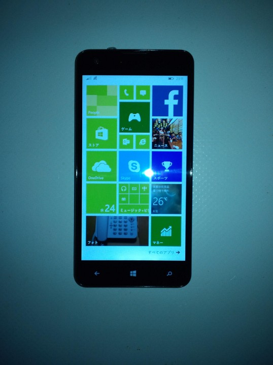 マウスコンピューター製スマートフォンの液晶画面側から見た画像